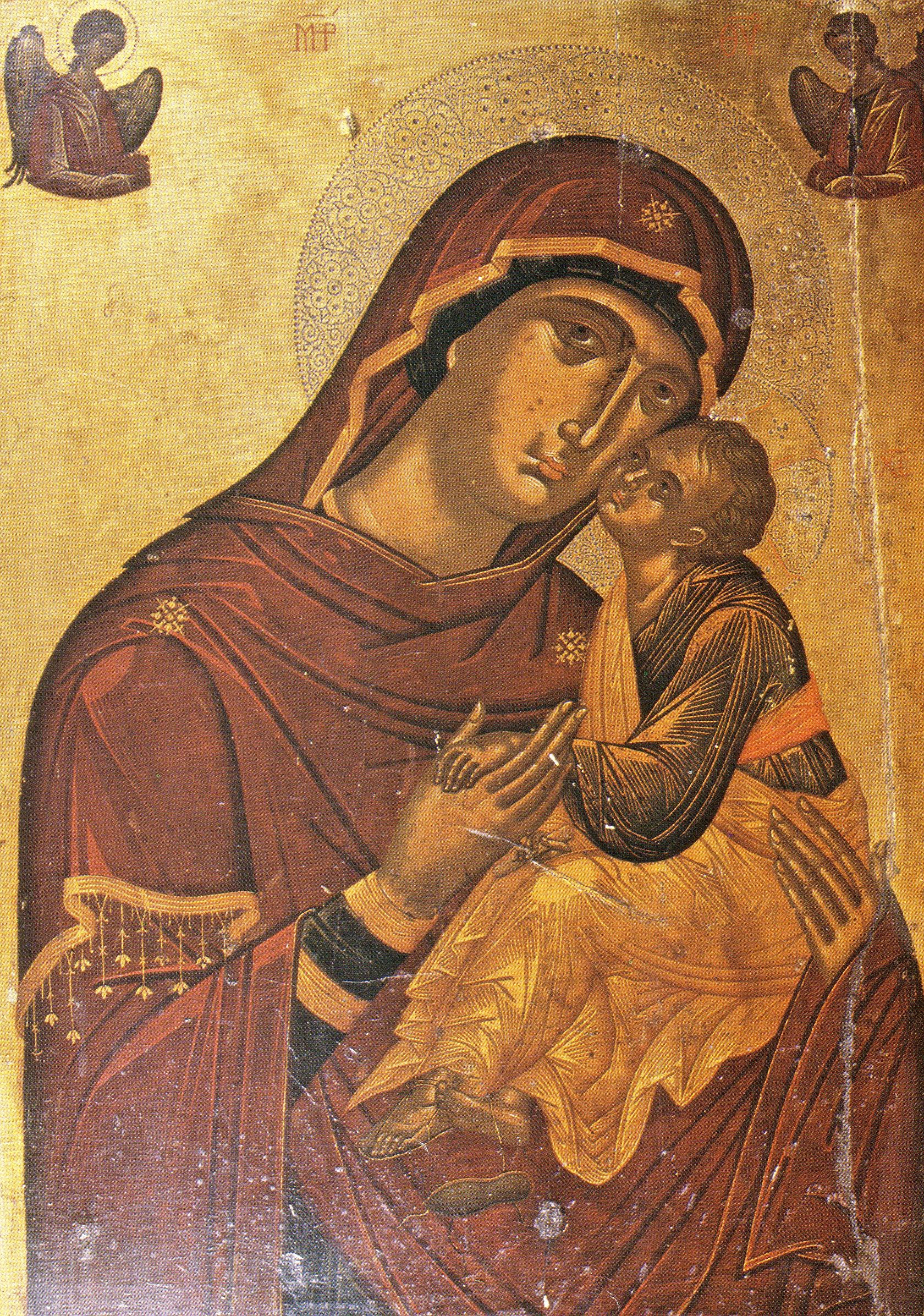 Madonna in stile bizantineggiante, di Rico de Candia, XVI secolo. Chiesa di Ognissanti o dei Templari, Trani.